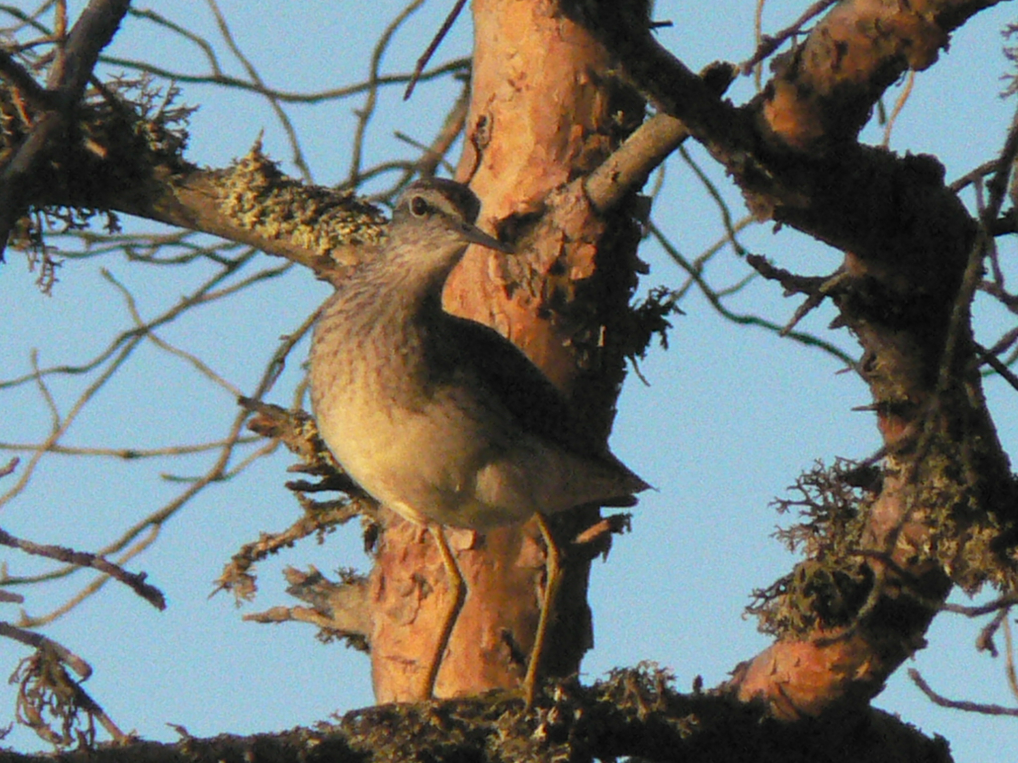 Tringa glareola, Ida Viru, Estonia